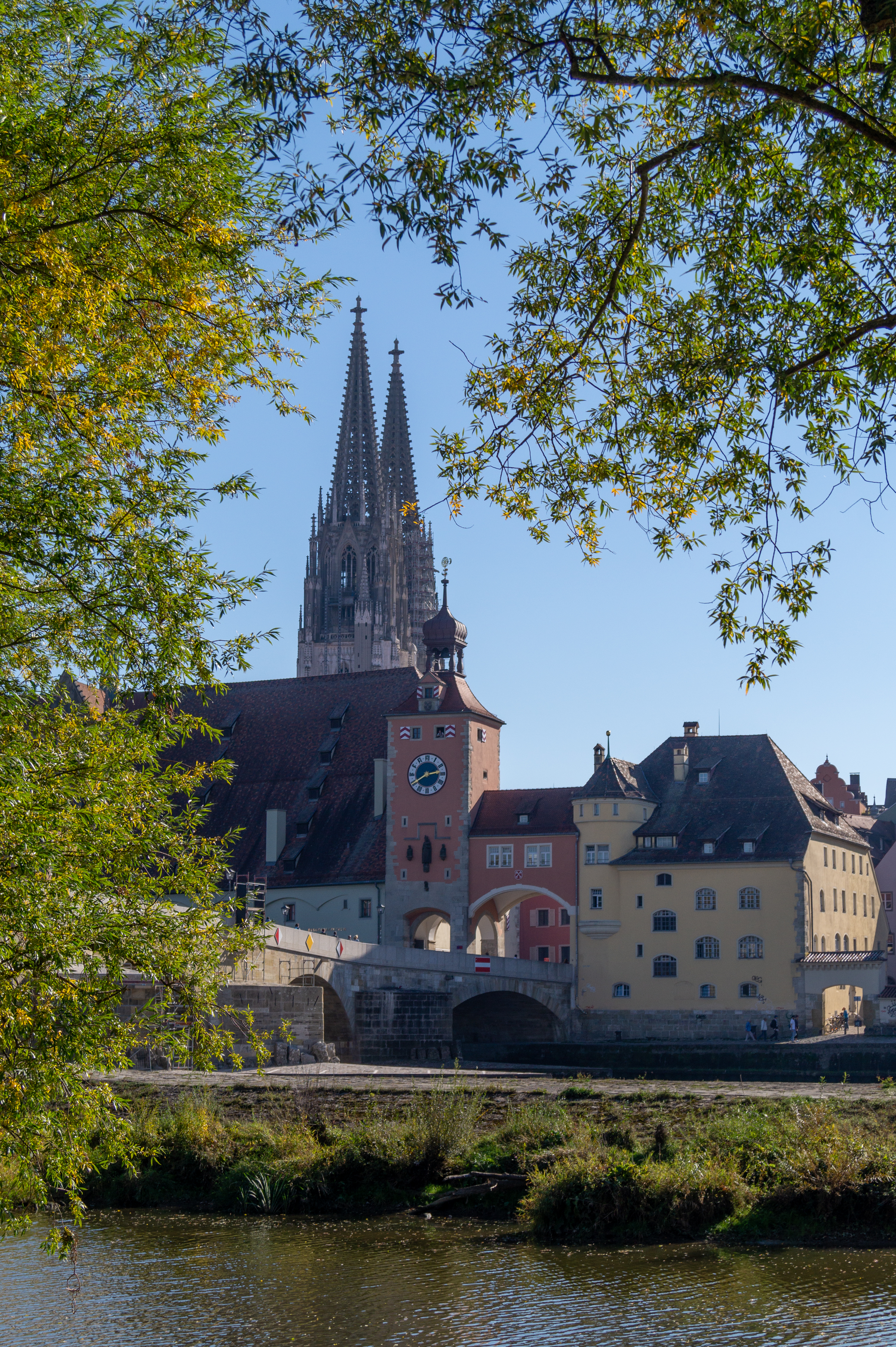 Amberger Stadel und Brückturm in Regensburg vom Oberen Wöhrd aus gesehen